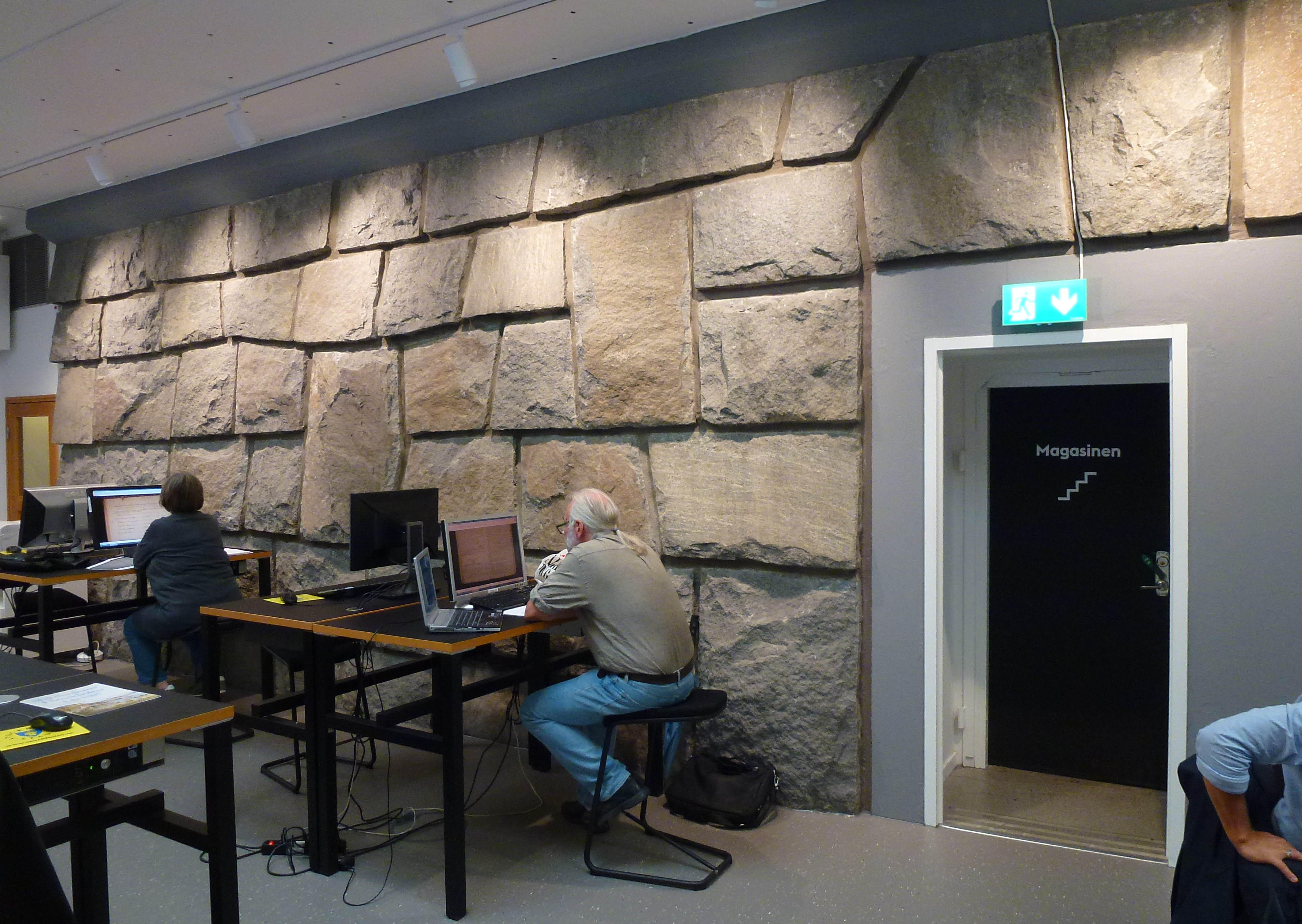 Stockholms stadsarkiv, gamla entrén